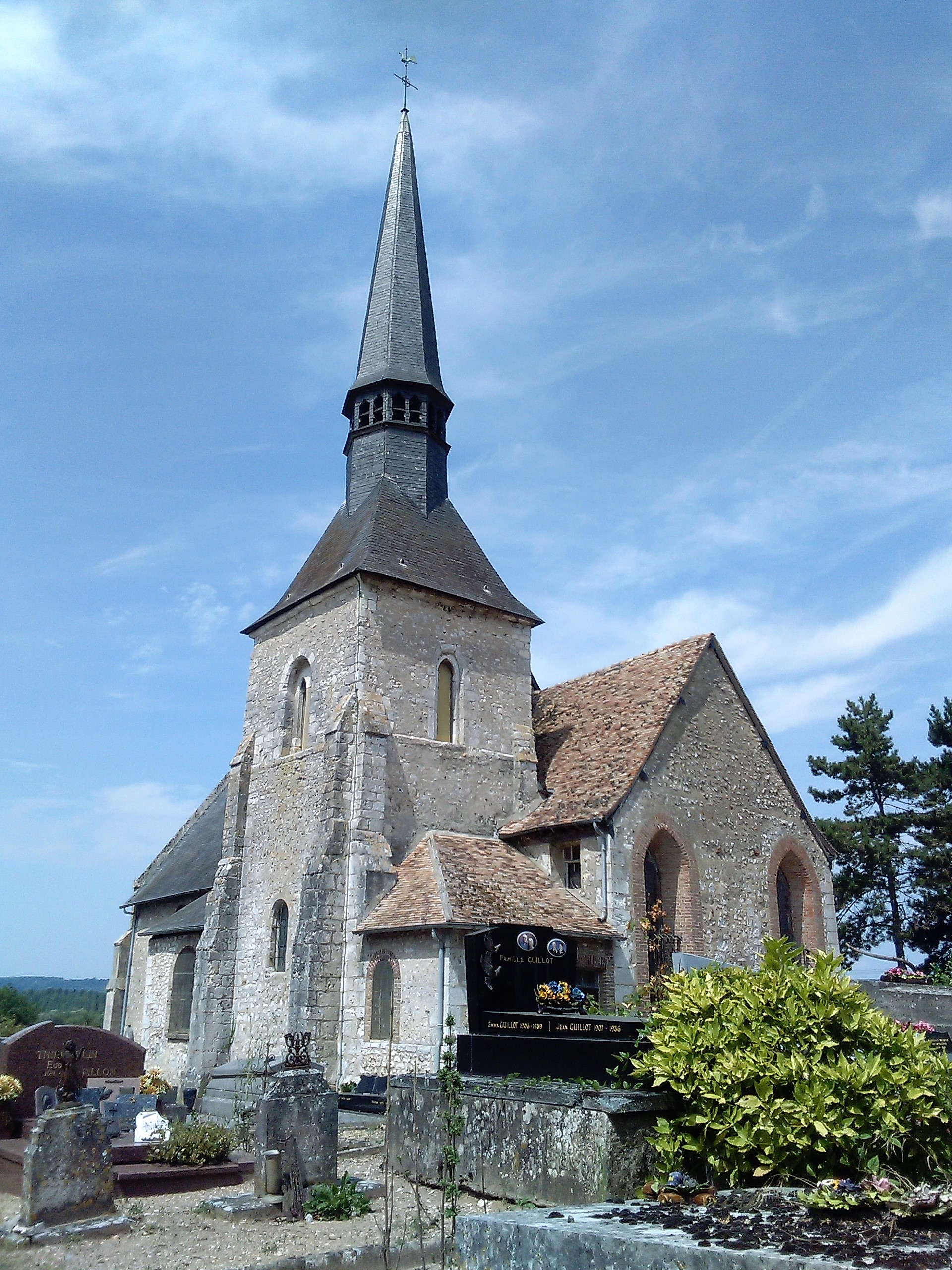 Église Saint-Pierre de Bouafles, Eure